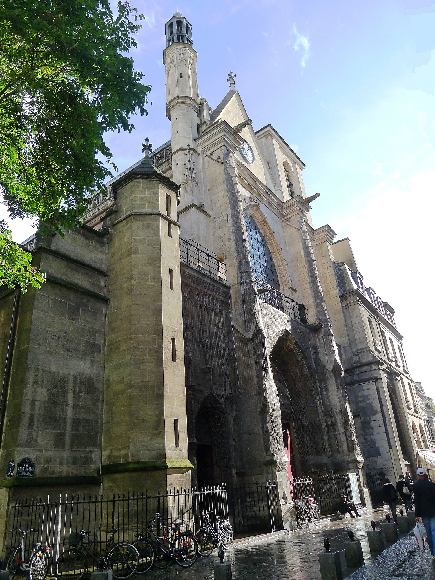 Église Saint-Merri - Paris IV